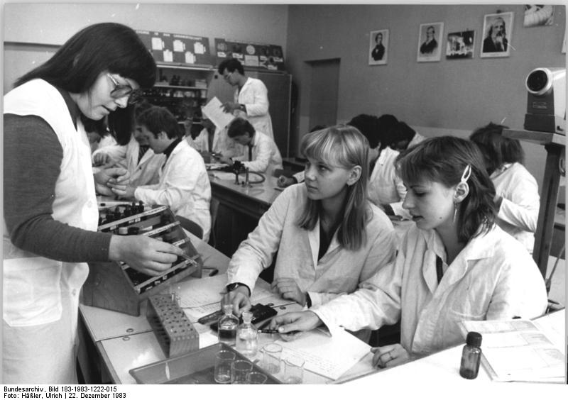 Pesterwitz, Chemieunterricht, Berufsschule ADN-ZB Häßler 22.12.83 Bez. Dresden: Lehrlingsausbildung. In der Betriebsberufsschule des VEG Pesterwitz bei Dresden werden Zootechniker für die Rinder- und Geflügelproduktion, Agrotechniker und Forstfacharbeiter ausgebildet. In einer zwei- bzw. dreijährigen (mit Abitur) Lehrzeit eignen sich gegenwärtig 560 Jugendliche fundiertes Wissen und Können an, so u.a. im Chemieunterricht bei Lehrerin Andrea Kramer die Lehrlinge Eliane Kuntze (r.) und Kathlen Bleier (2.v.r.). siehe auch 1983-1222-16N